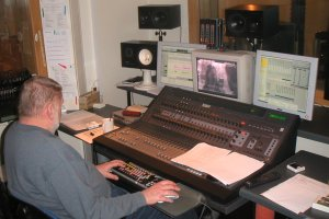 Pražské dabingové studio LS Productions.